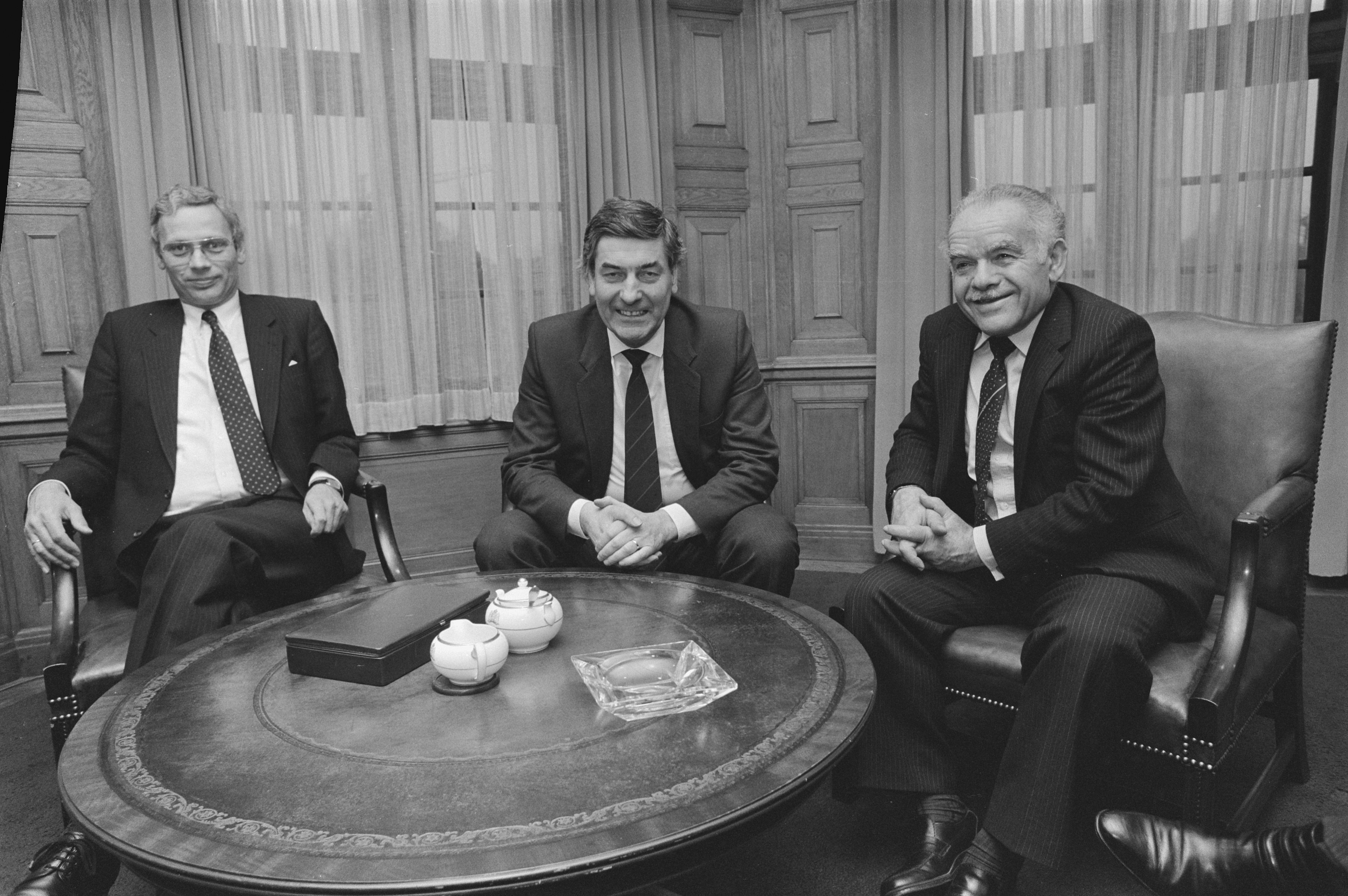 Collectie / Archief : Fotocollectie Anefo Reportage / Serie : [ onbekend ] Beschrijving : Premier Lubbers ontvangt minister Shamir Datum : 28 februari 1985 Trefwoorden : ministers, ontvangsten, premiers Persoonsnaam : Lubbers, Ruud Fotograaf : Bogaerts, Rob / Anefo Auteursrechthebbende : Nationaal Archief Materiaalsoort : Negatief (zwart/wit) Nummer archiefinventaris : bekijk toegang 2.24.01.05 Bestanddeelnummer : 933-2509